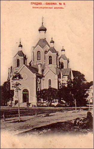 Свята-Аляксандра-Неўская царква ў Гродне